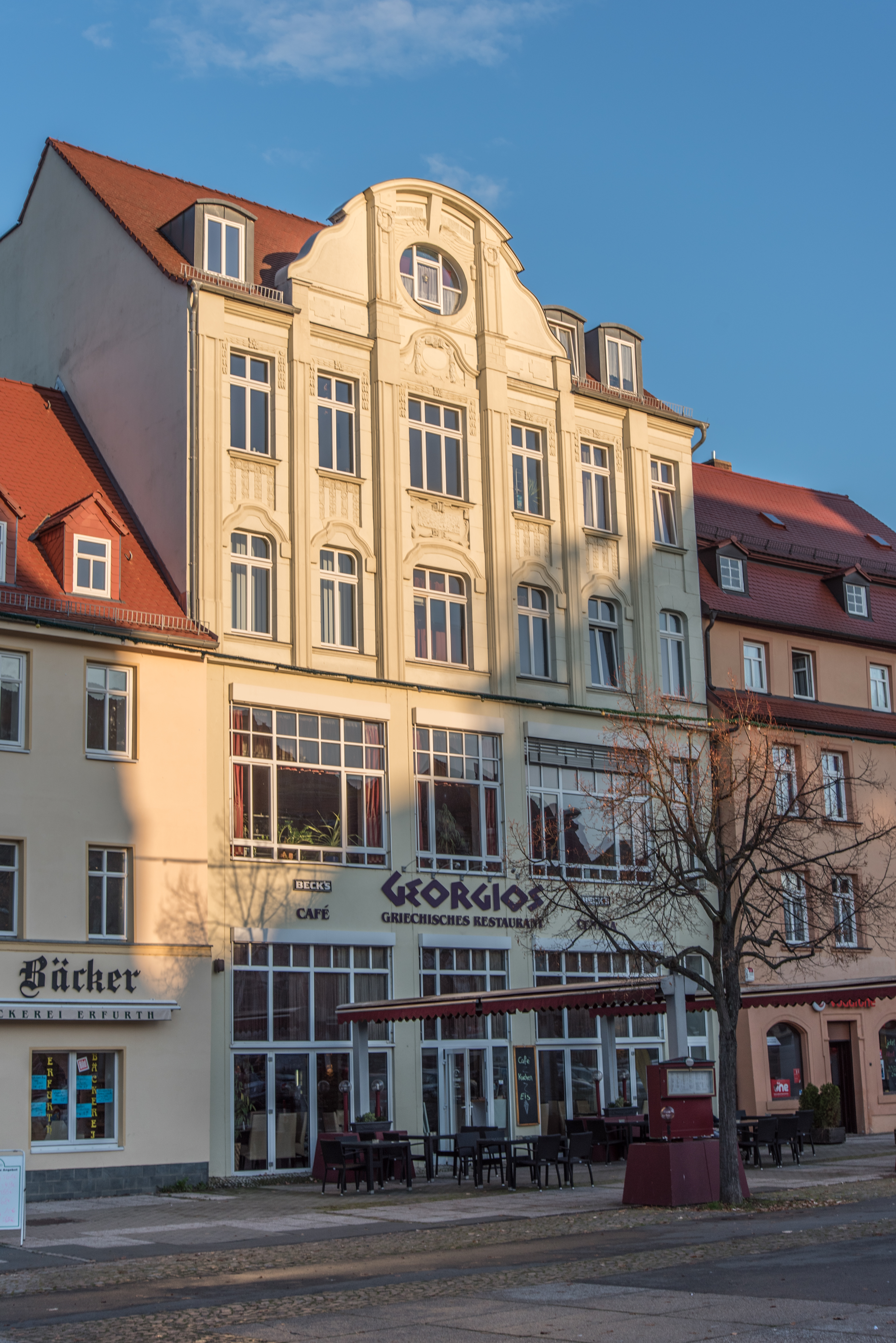 Weißenfels, Markt 12